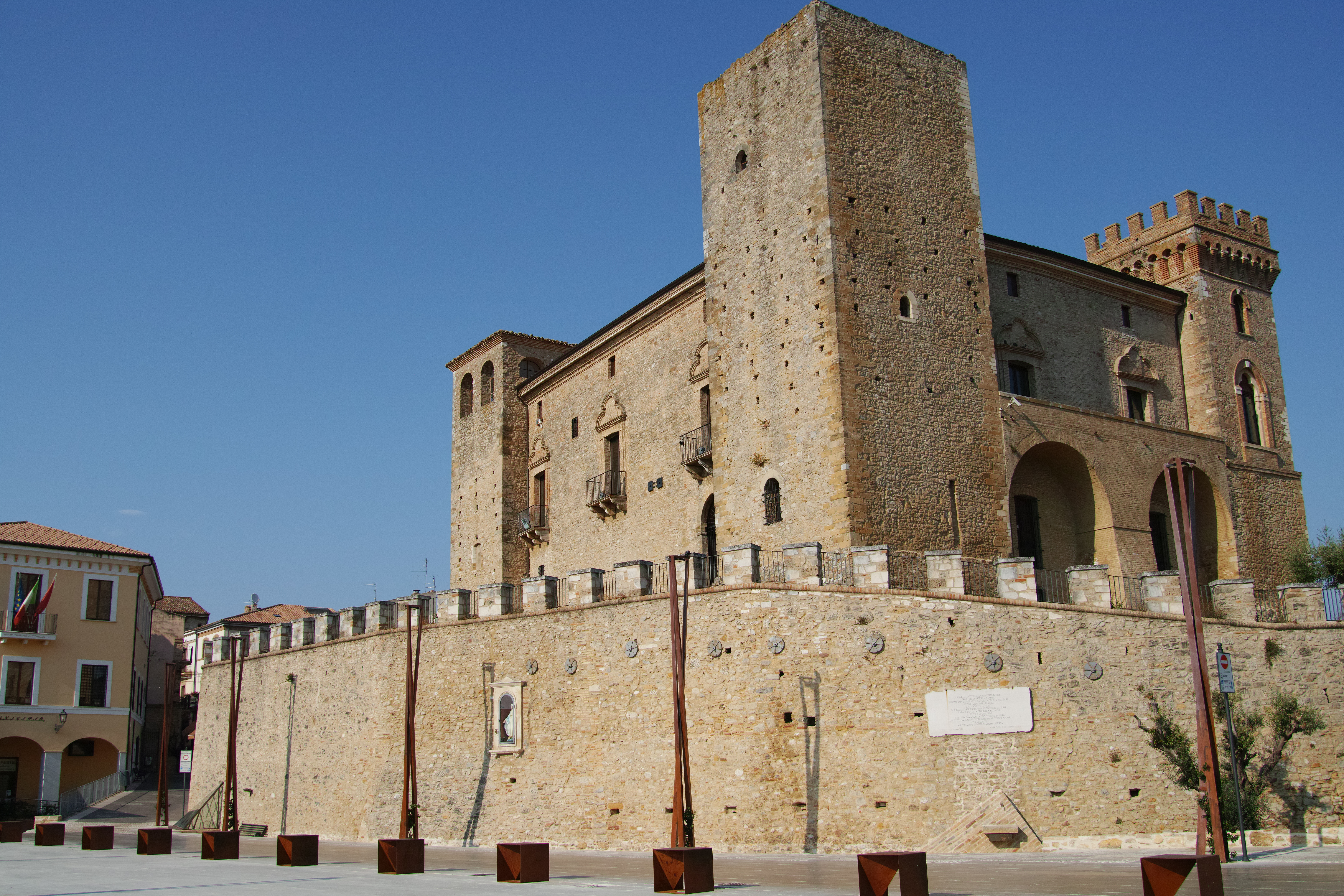 PASSEGGIATA TRA LE BELLEZZE DEL TERRITORIO This is a photo of a monument which is part of cultural heritage of Italy.